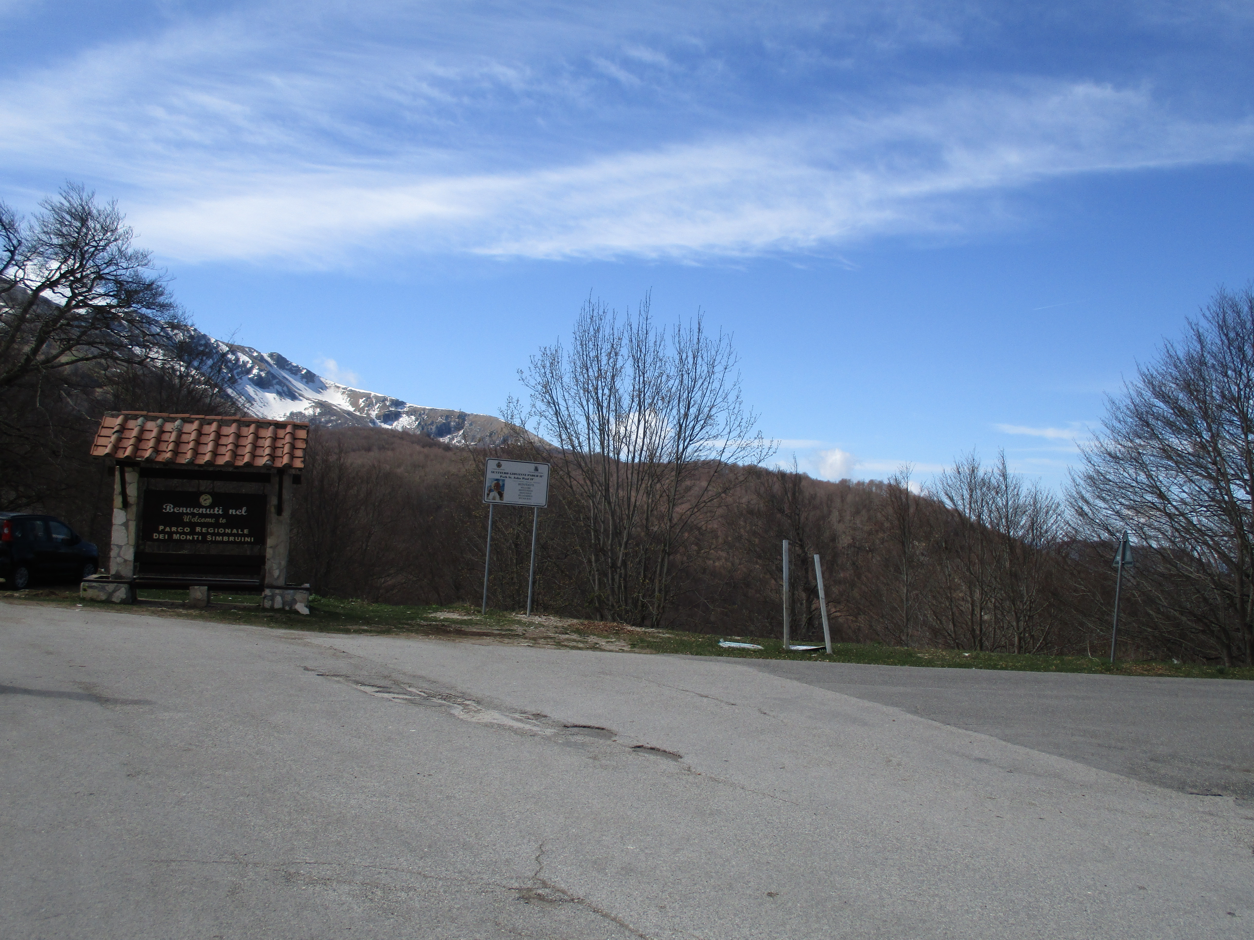 Passo di Serra Sant'Antonio